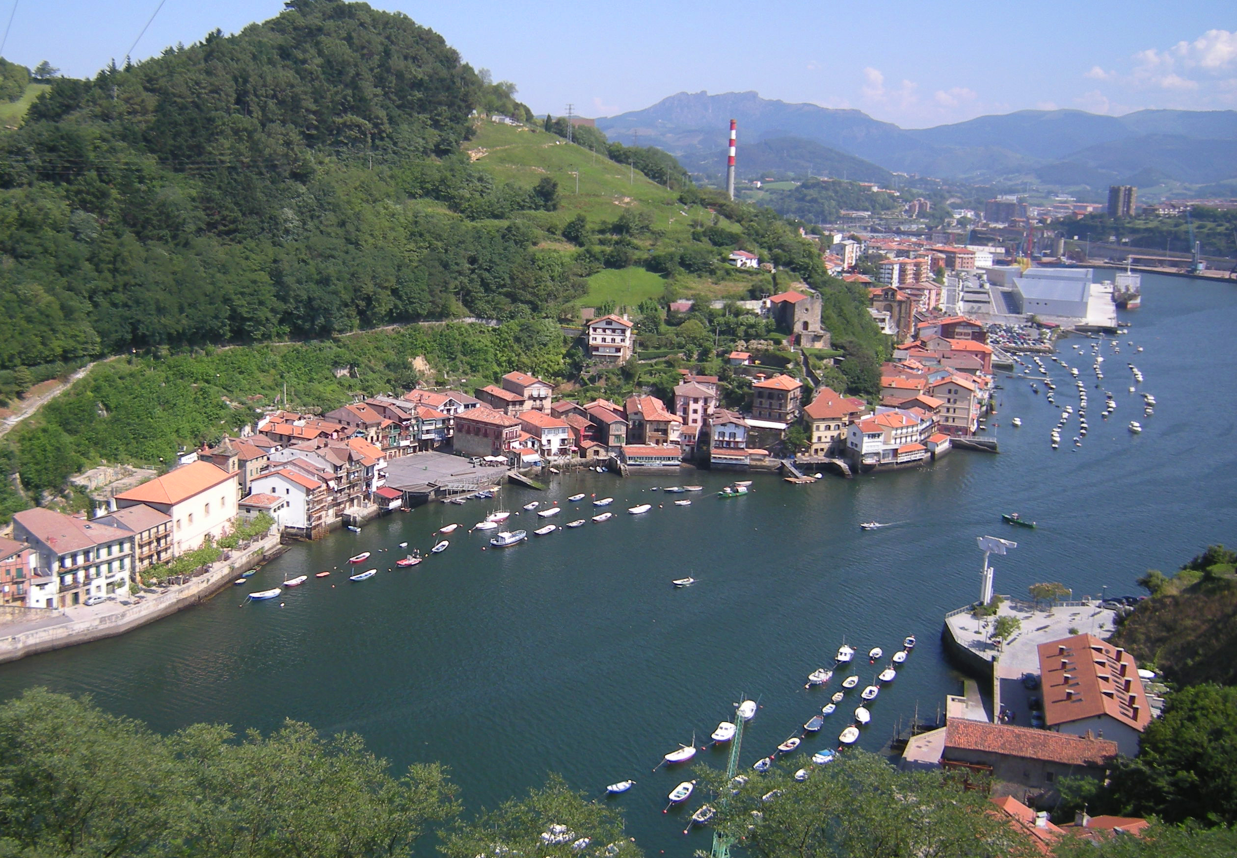 Pasai Donibane, Gipuzkoa. Espainia. Pasajes Port, Guipuscoa. Spain.